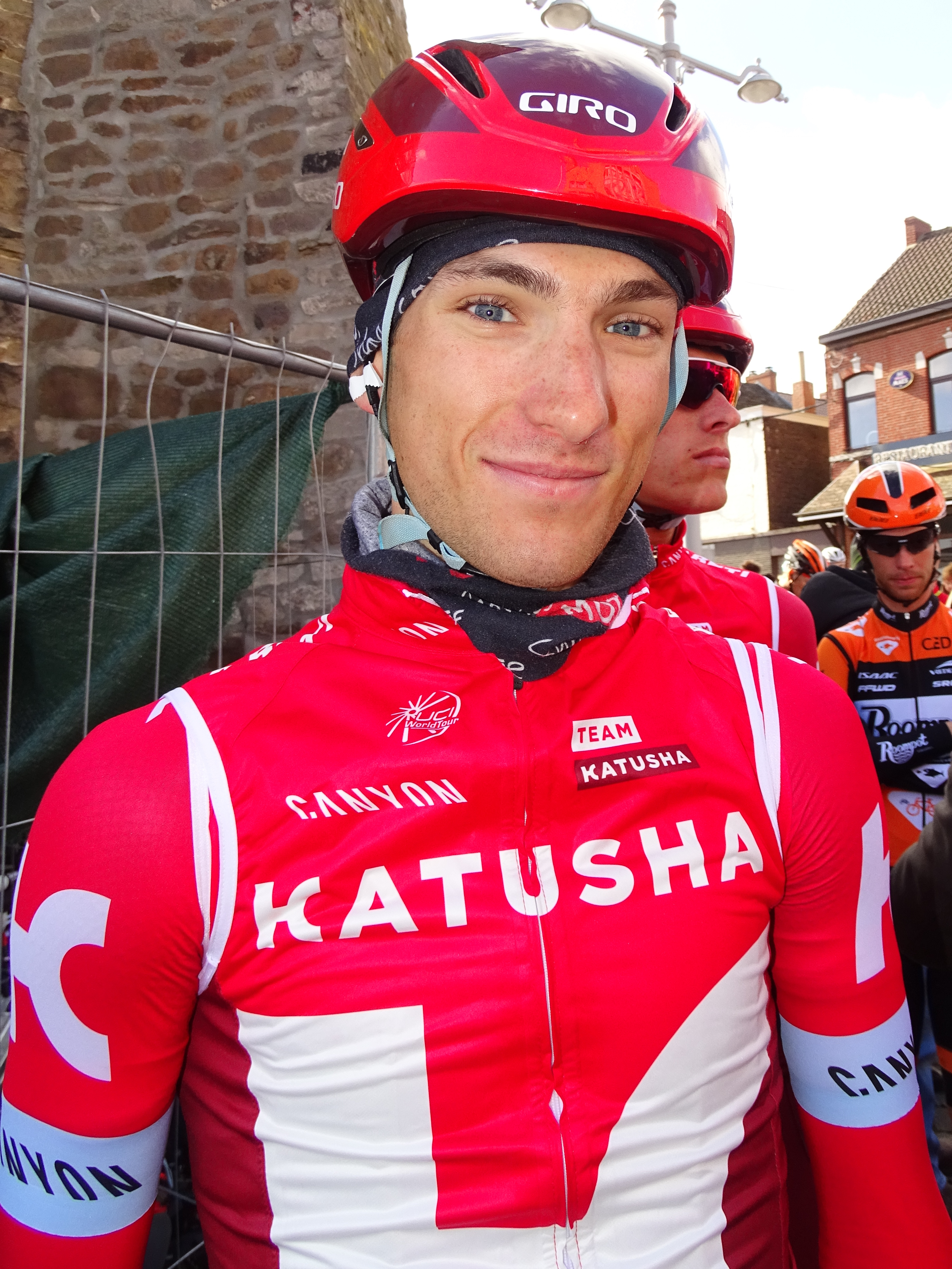 Reportage réalisé le mercredi 2 mars à l'occasion du départ du Samyn des Dames 2016 et du Samyn 2016 à Quaregnon, Belgique.